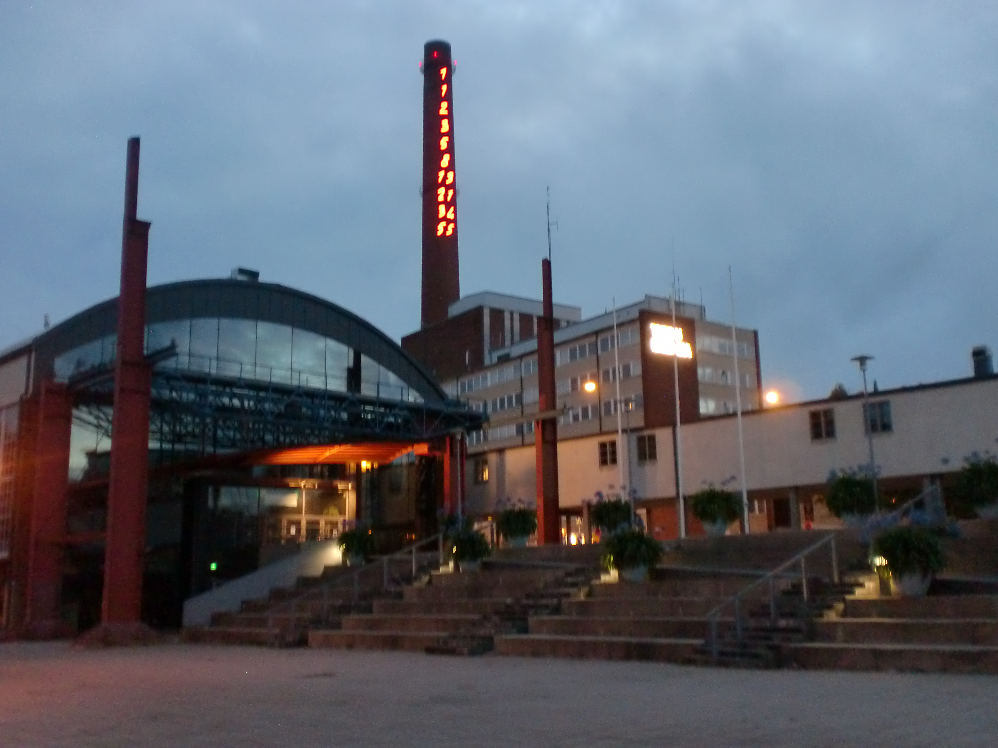 Turun konservatorio